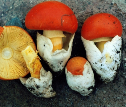 И Слободан